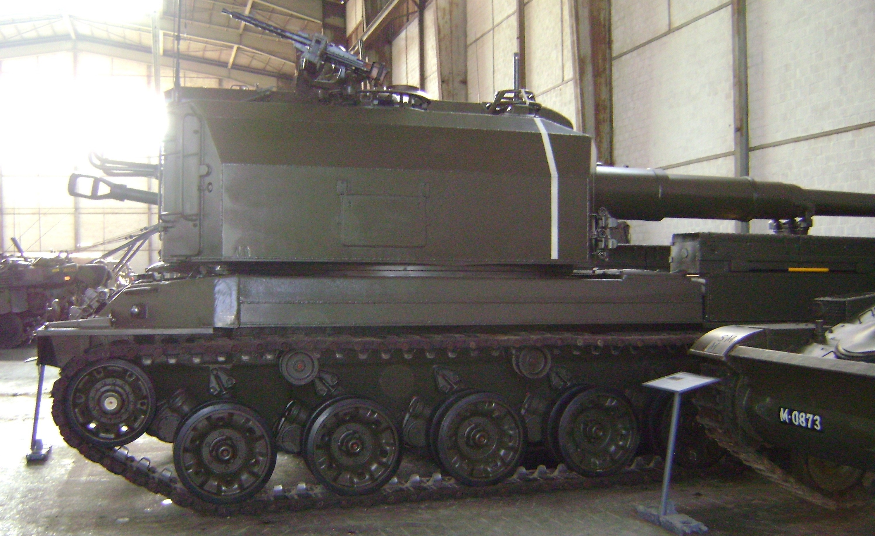 Panzerkanone 68 seite